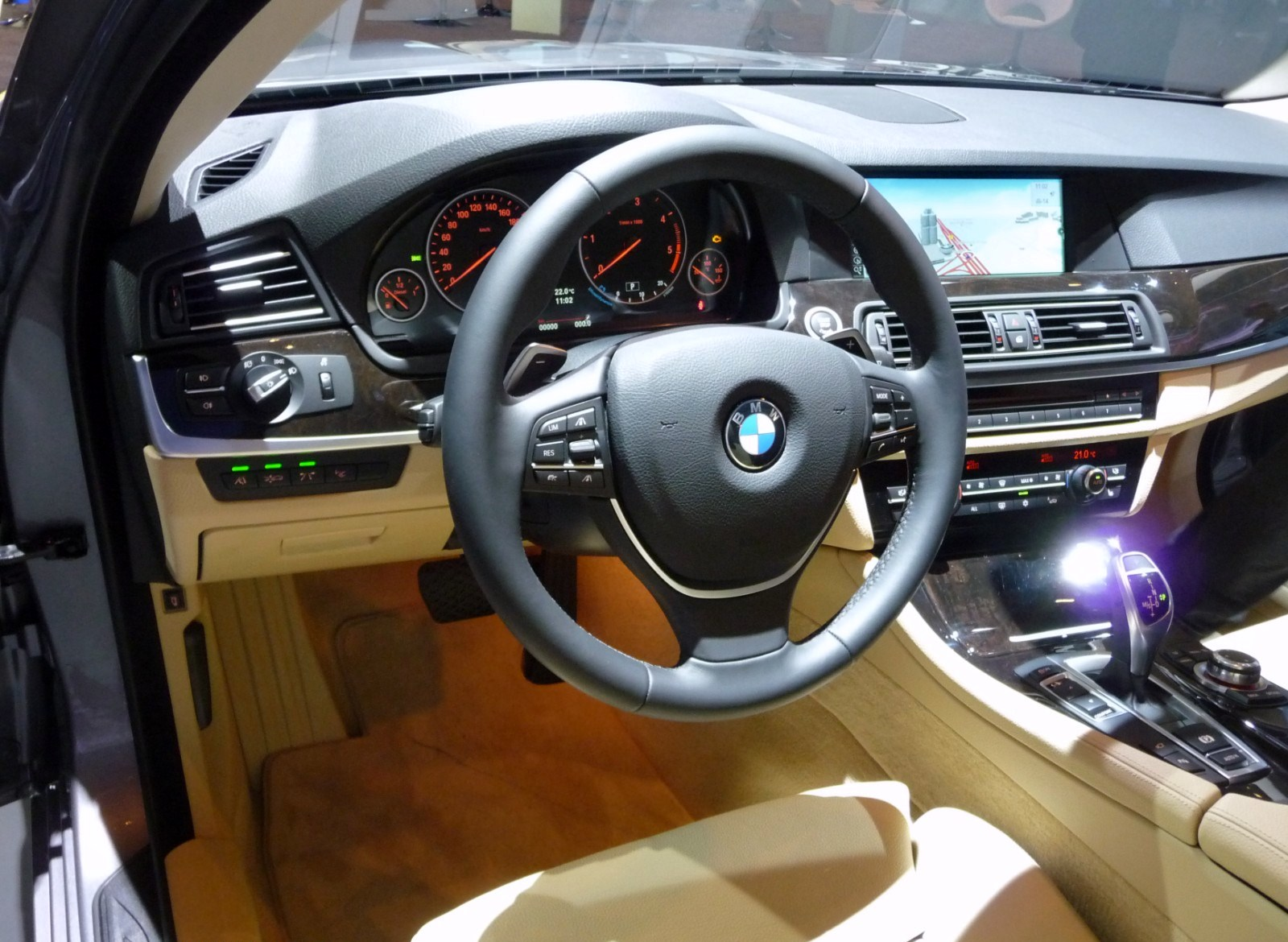 Interieur des BMW F10